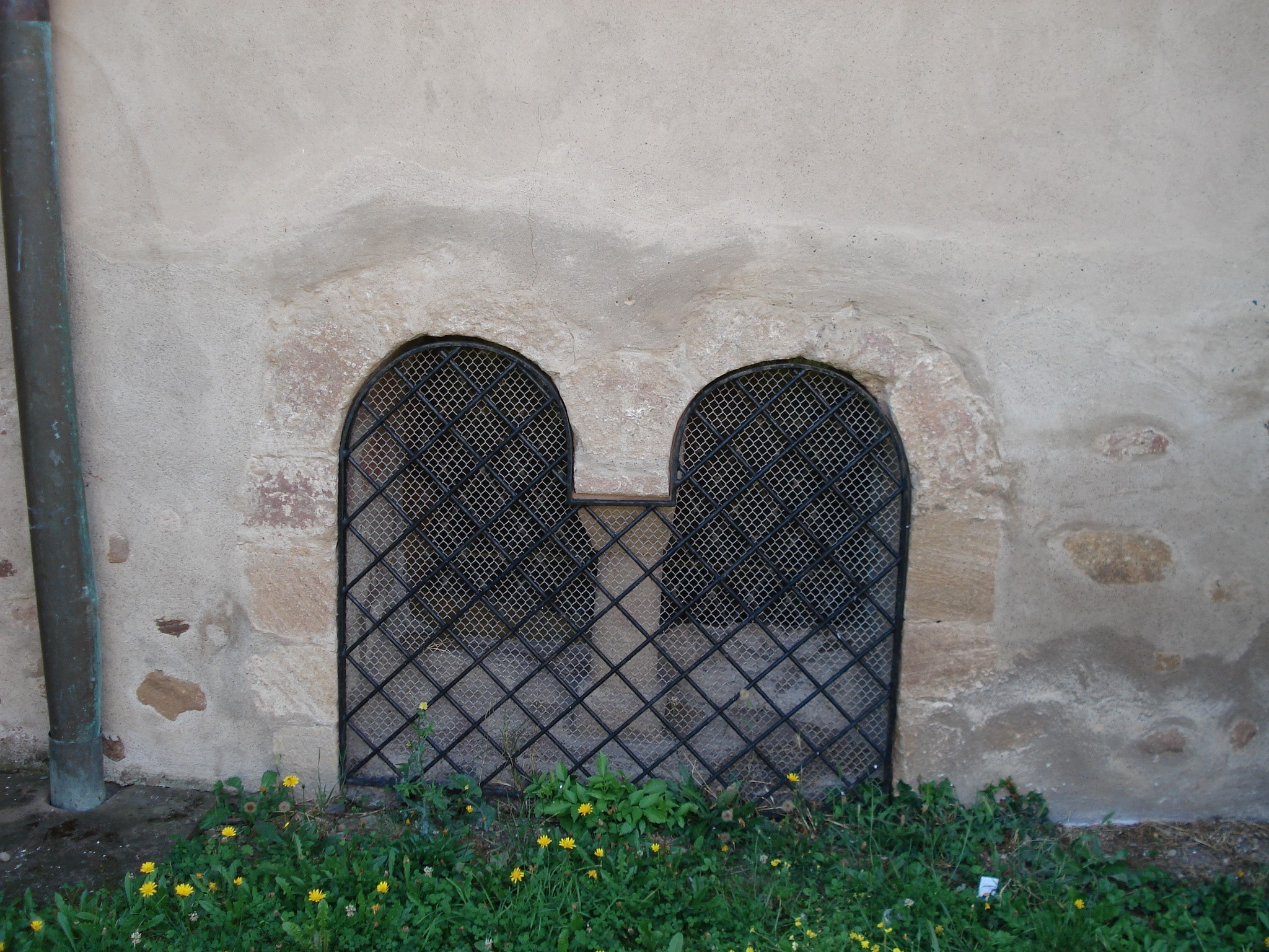 Wattwiller Eglise Fenêtre géminée romane